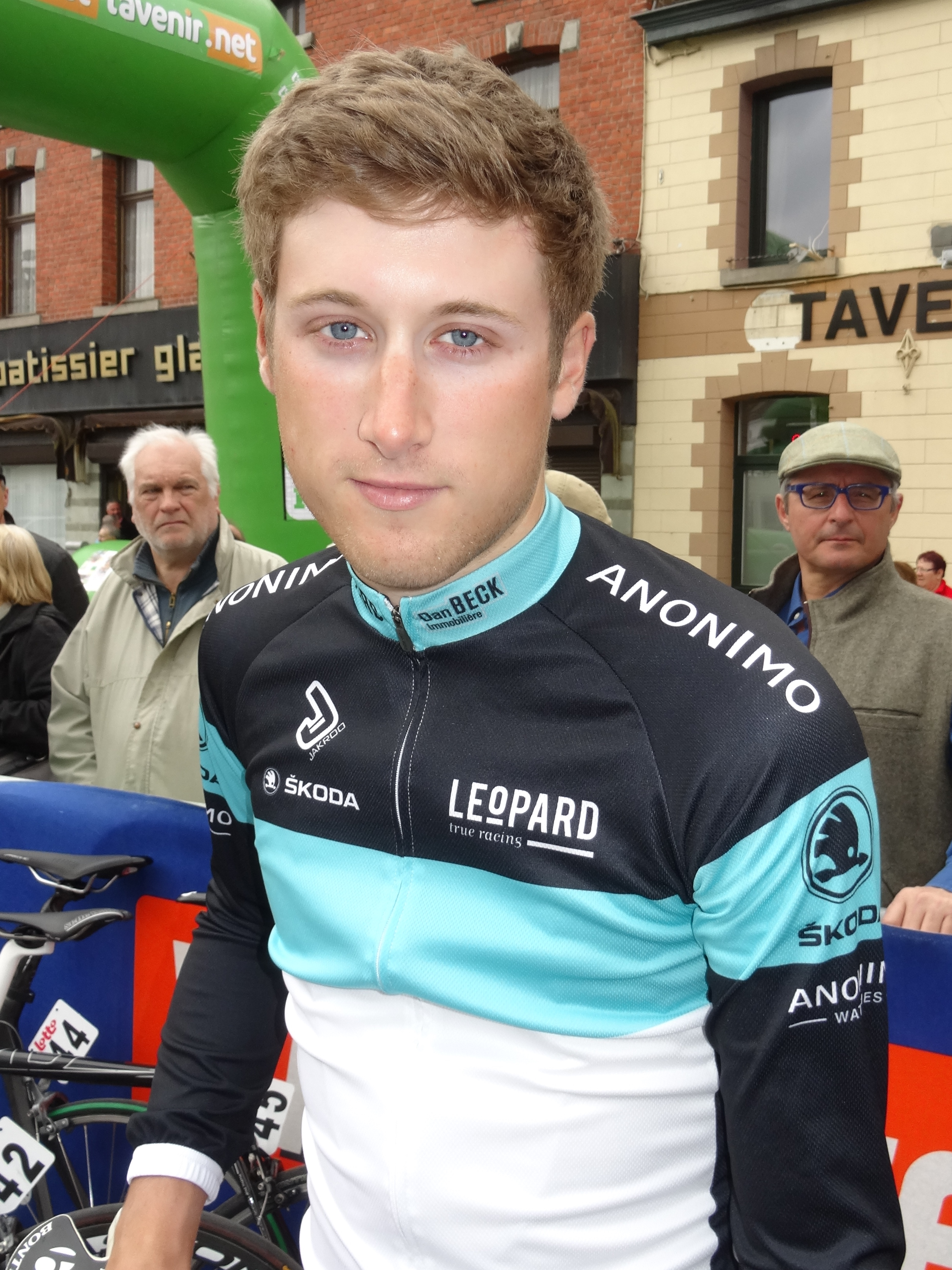 Triptyque des Monts et Châteaux 2014, étape 3, 6 avril 2014, départ de Belœil. Depicted person: Pit Schlechter Depicted team: Leopard Development The creation of these files was made possible thanks to the organizers of the Triptyque des Monts et Châteaux 2014 English | français | +/−